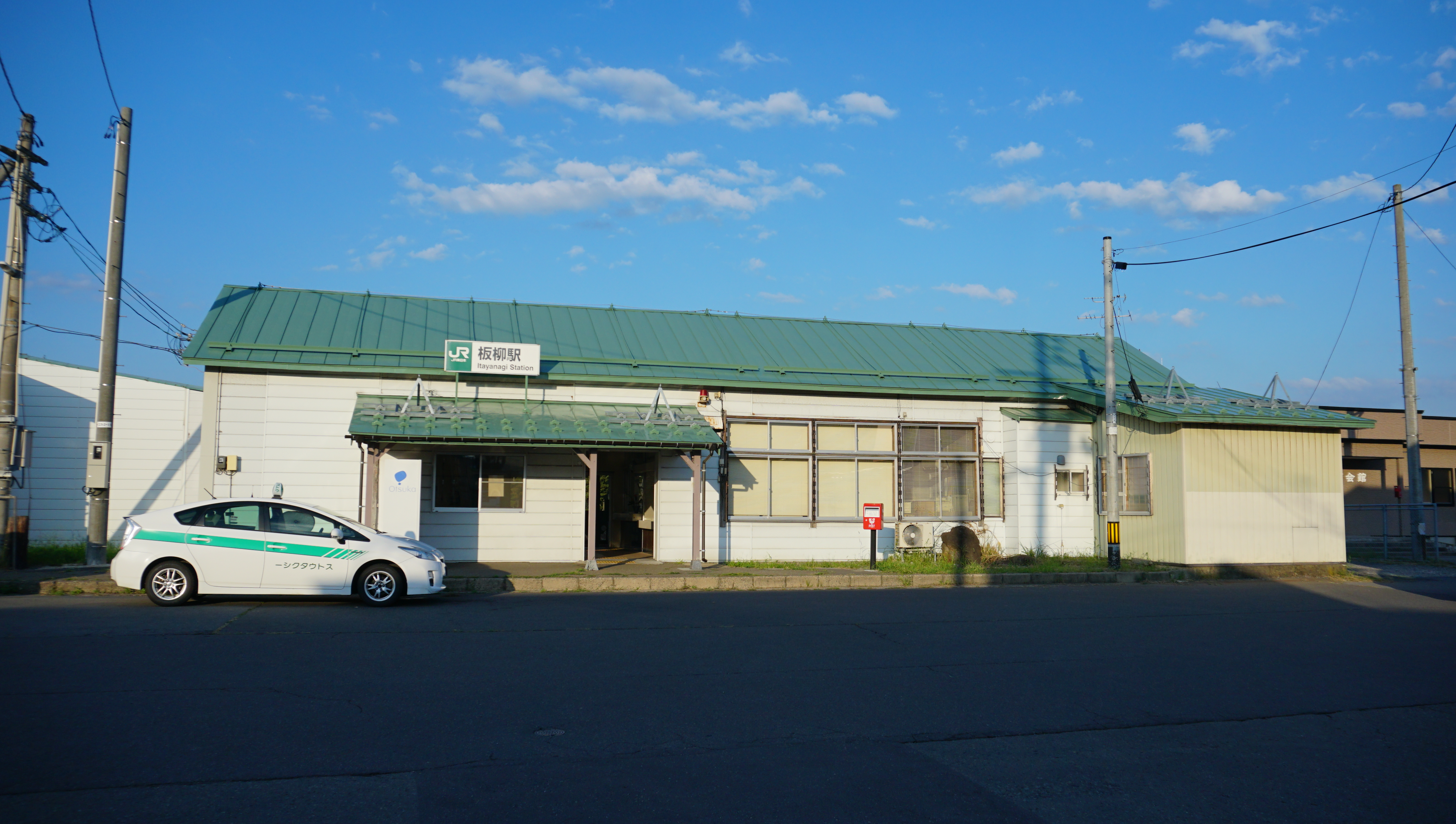 五能線 板柳駅（青森県北津軽郡板柳町）